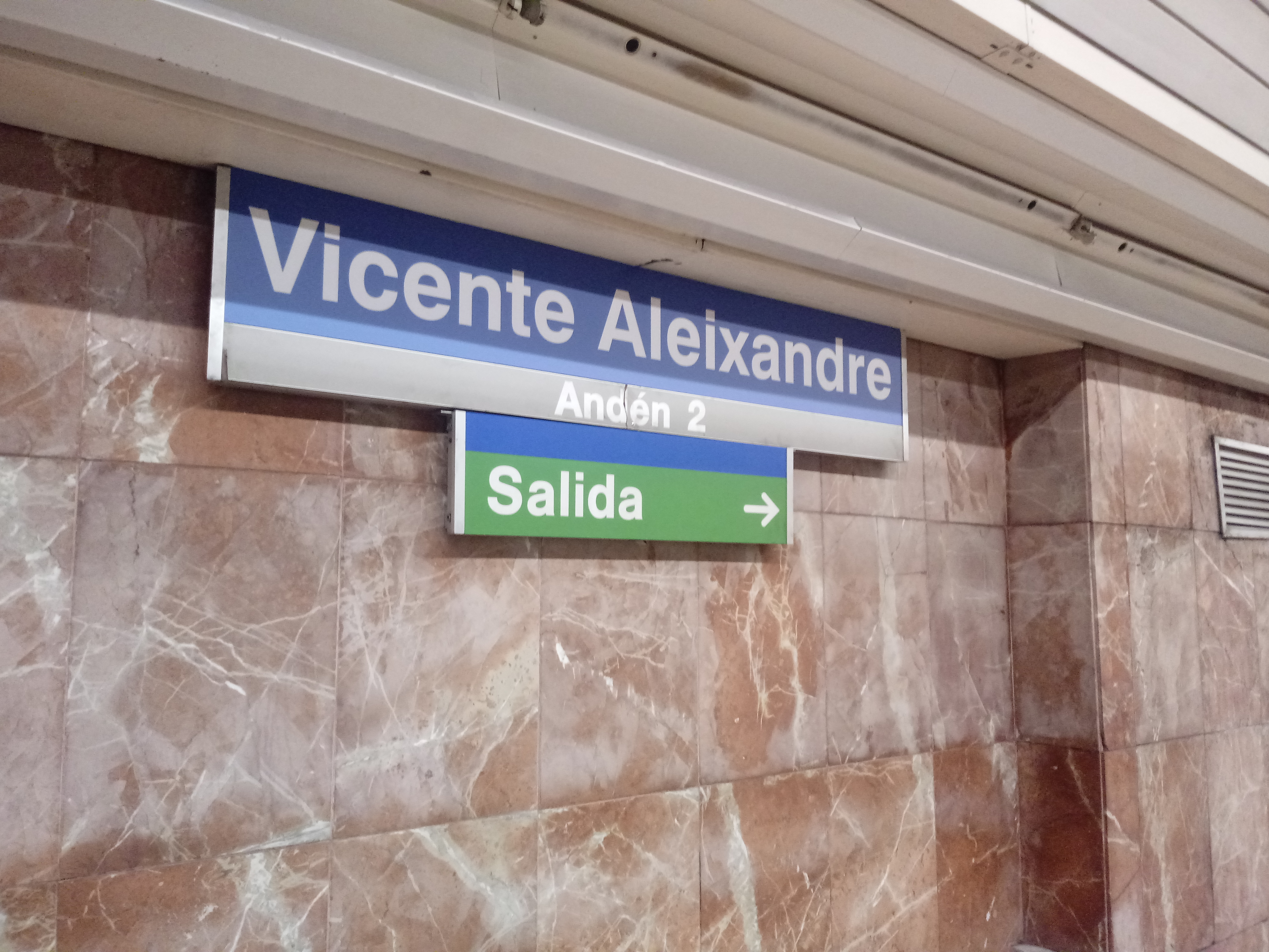 Cartel de la recién renombrada estación de Vicente Aleixandre del Metro de Madrid